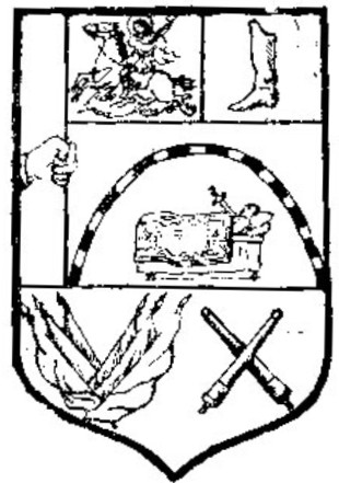 ამილახვართა ღერბი